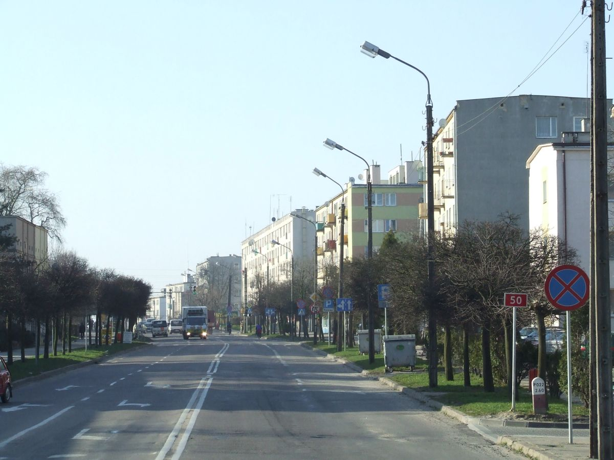 Ciechanów, główna ulica miasta